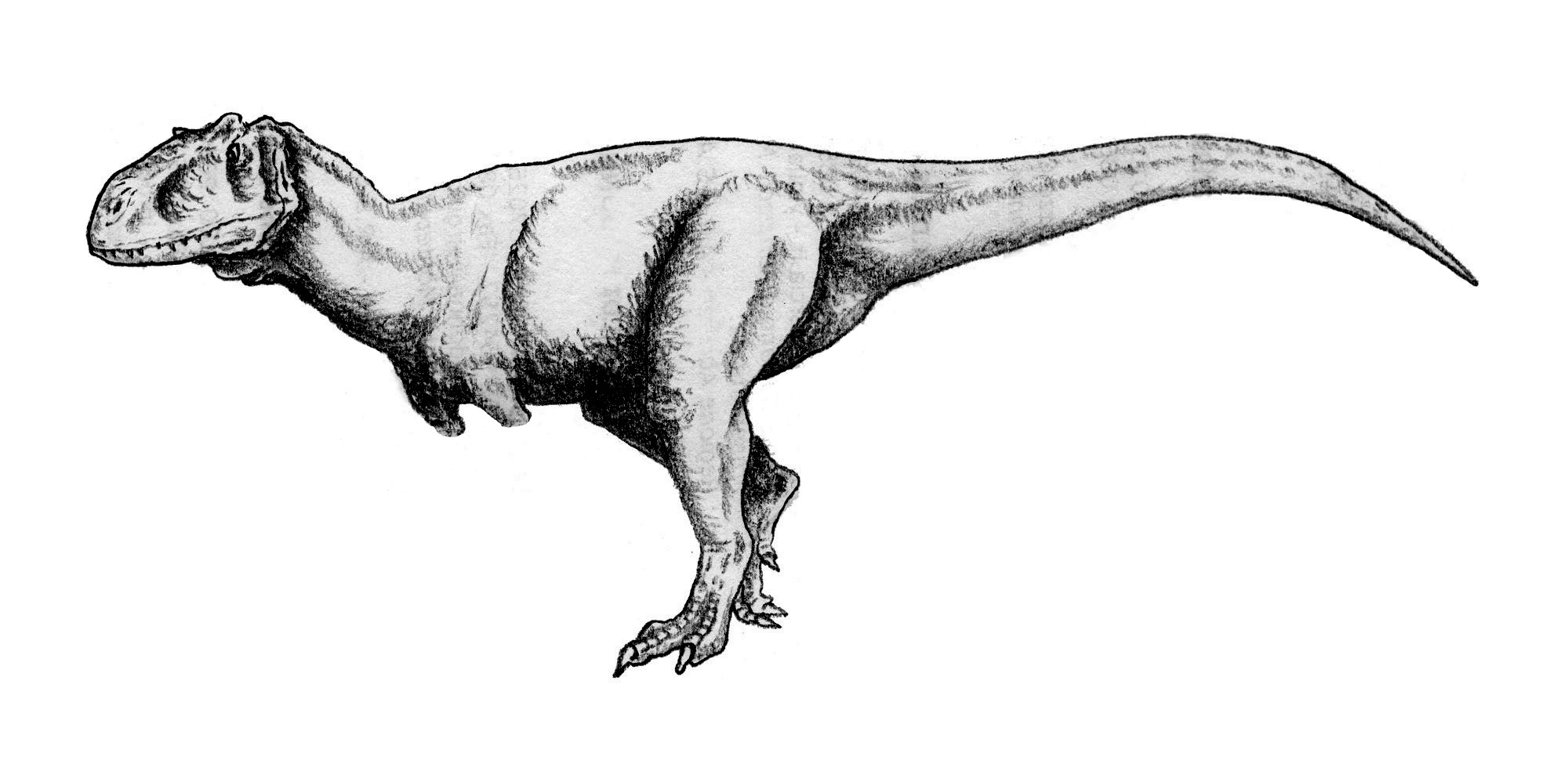 Rajasaurus narmadensis, an abelisaur from India